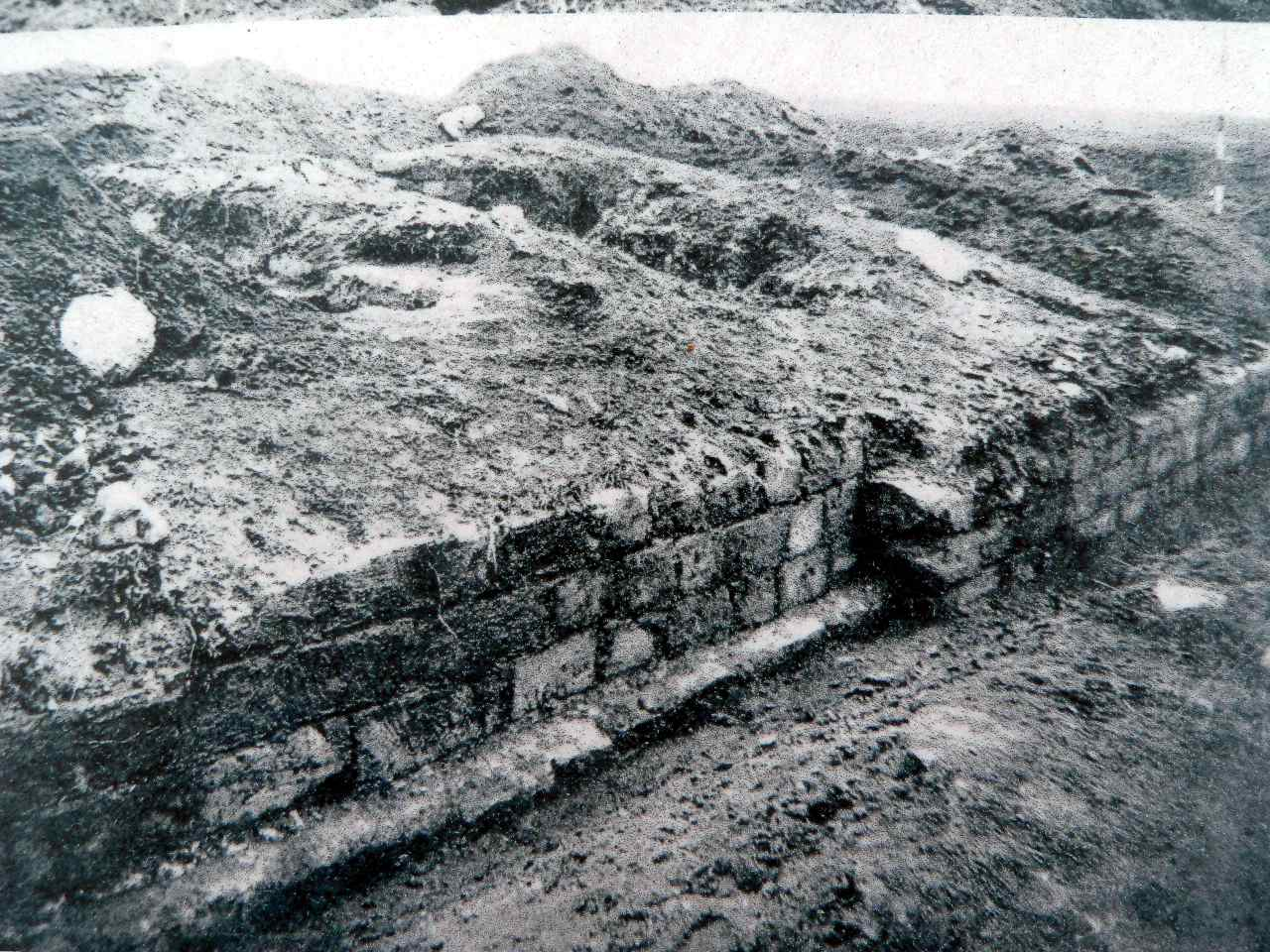 Erste Ausgrabungen von 1893 Kastell Arnsburg (Nordtor), Hessen, Deutschland